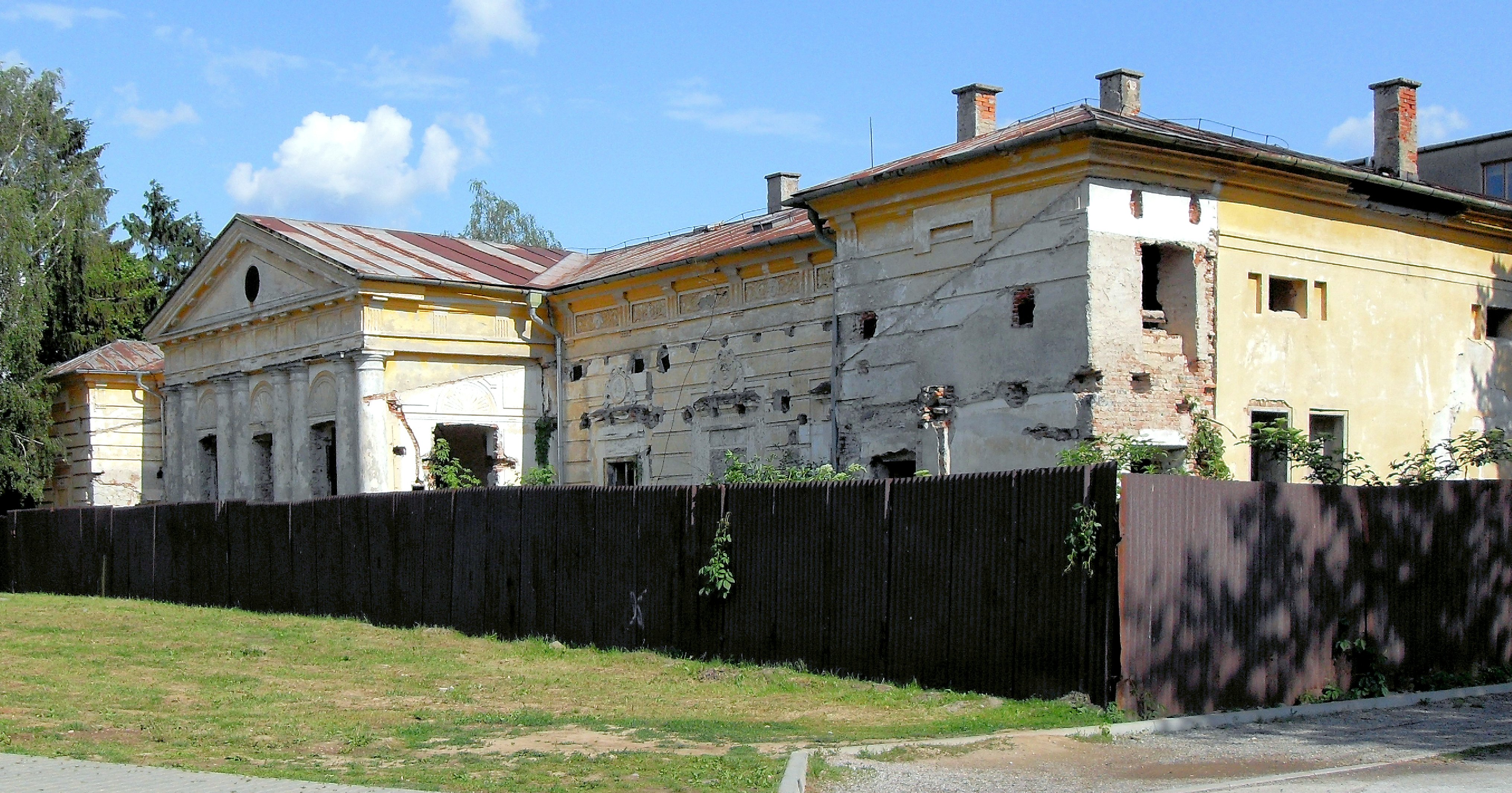 Košice-Krasná, kaštieľ Meškovcov